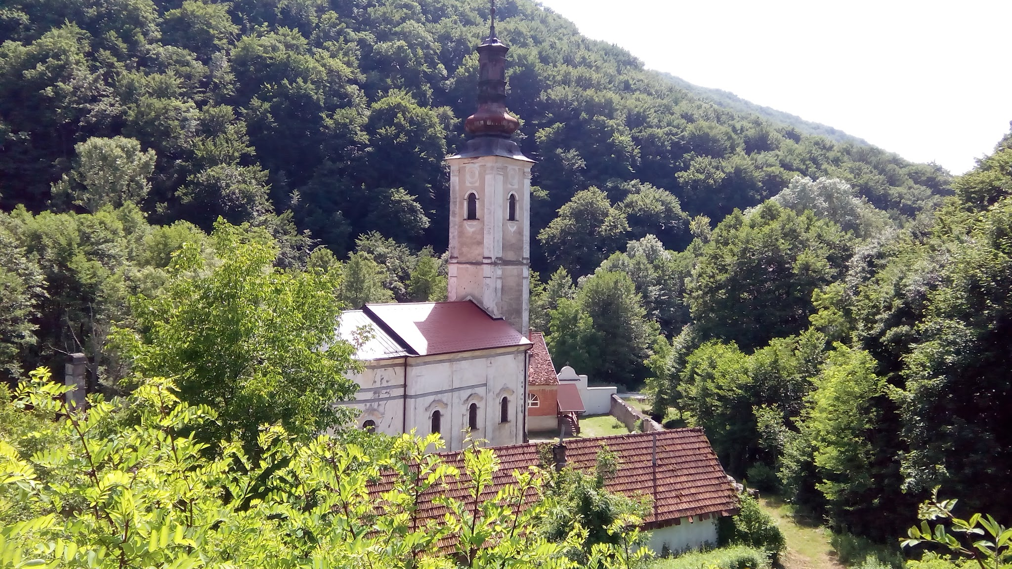 43500, Donji Borki, Croatia